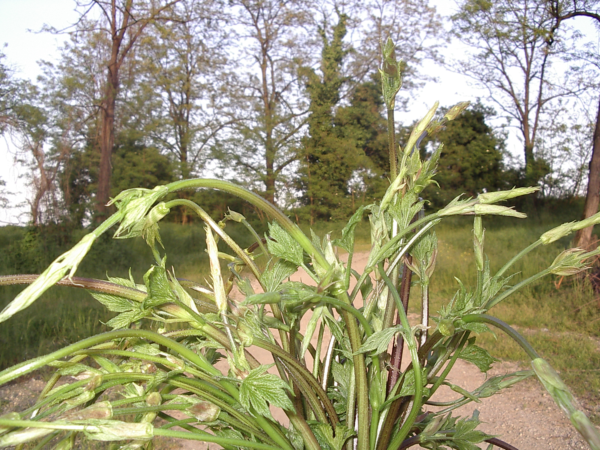 shoots of Humulus lupulus